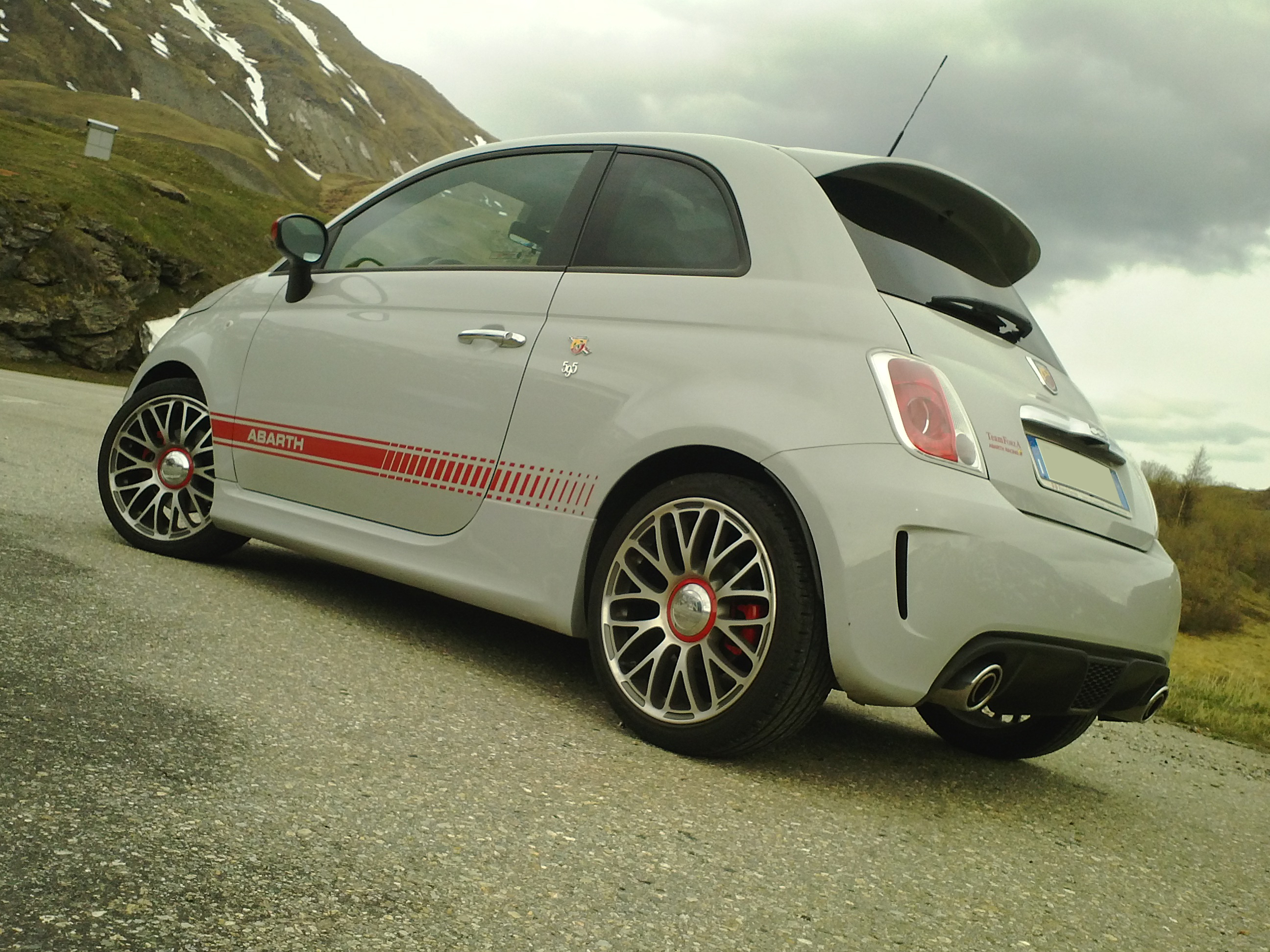 Abarth Kit 595 Elaborazione